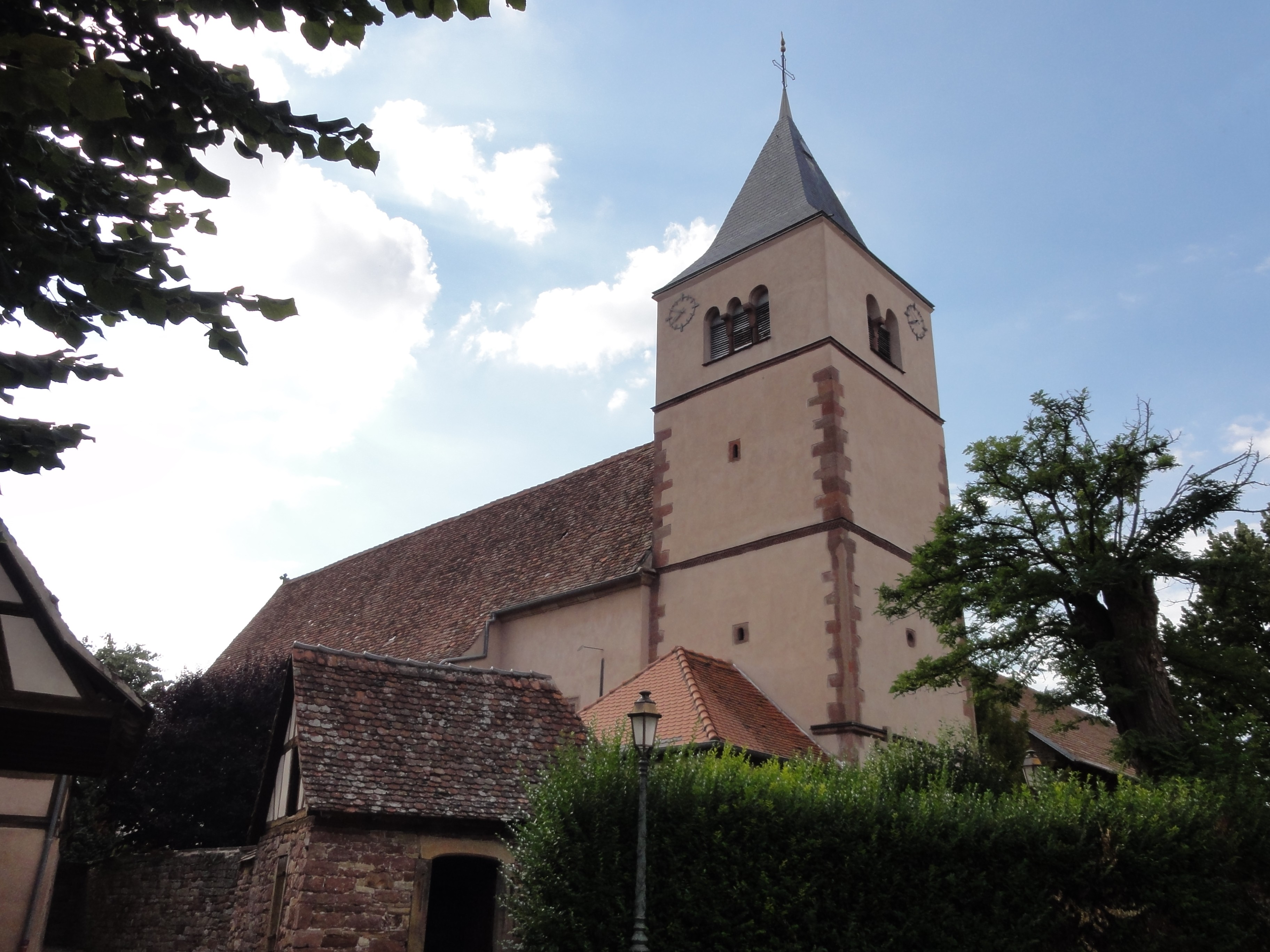 Alsace, Bas-Rhin, Fessenheim-le-Bas, Ancien poste de garde et Église St Martin (IA67005527).